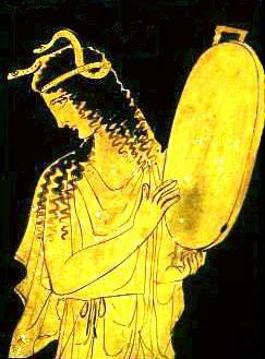 Framedrumming goddess